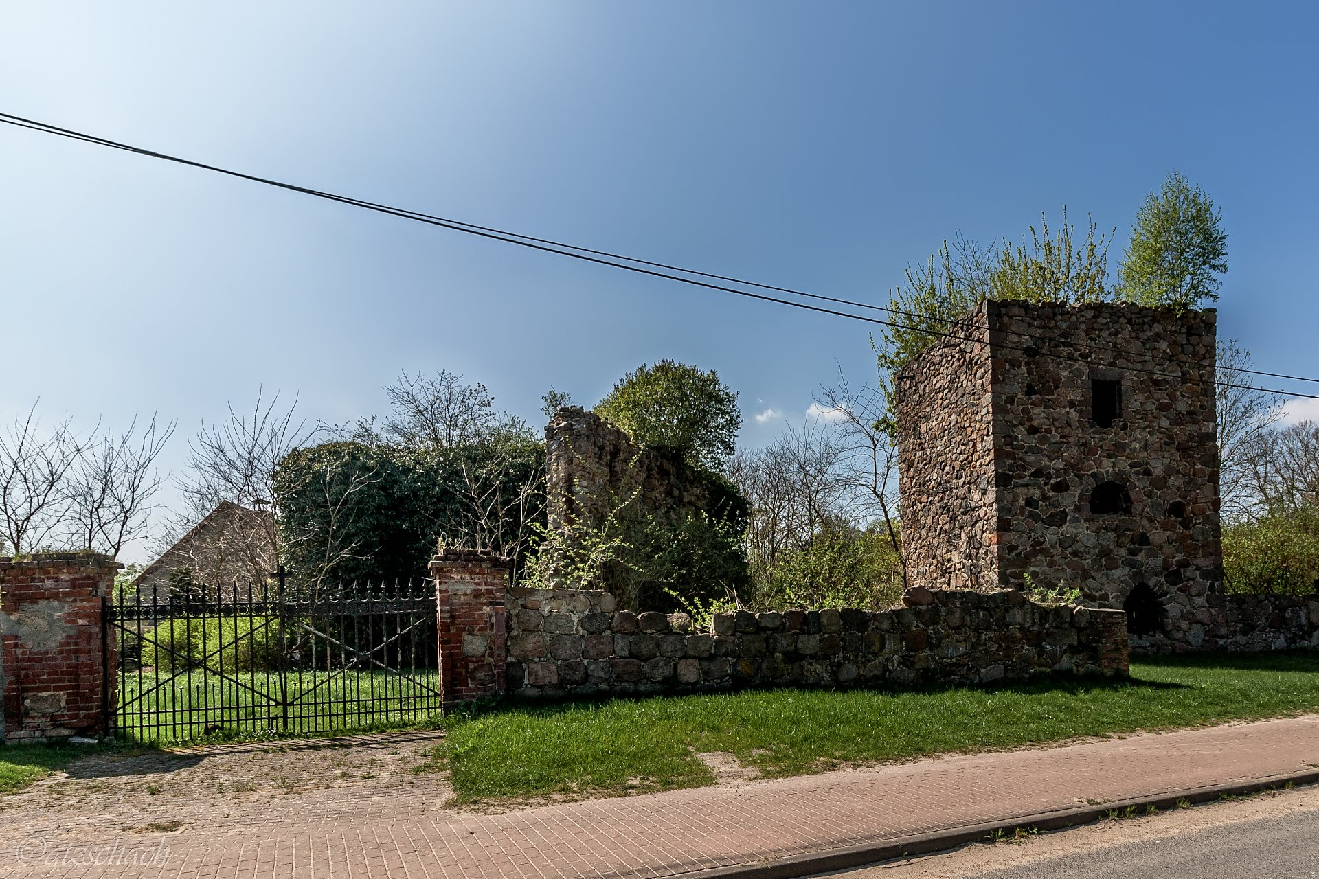 Wüste Kirche Groß Sperrenwalde